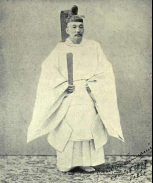 正装の三宮義胤